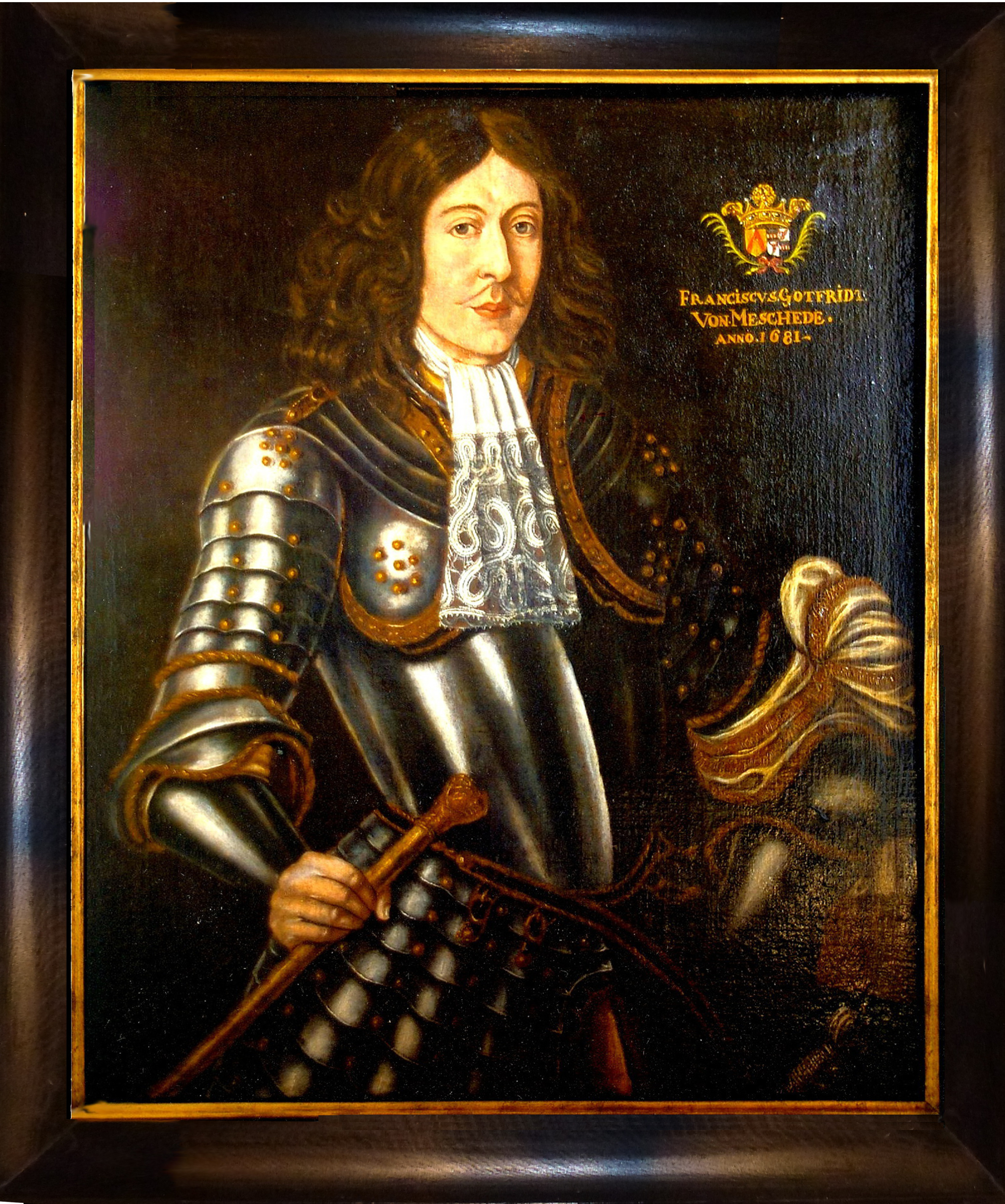 Ölgemälde als Leihgabe der Geschwistern Dr. Leo und Monika Voss an die Pfarrgemeinde St. Walburga Meschede (Schatzkammer St.Walburga)